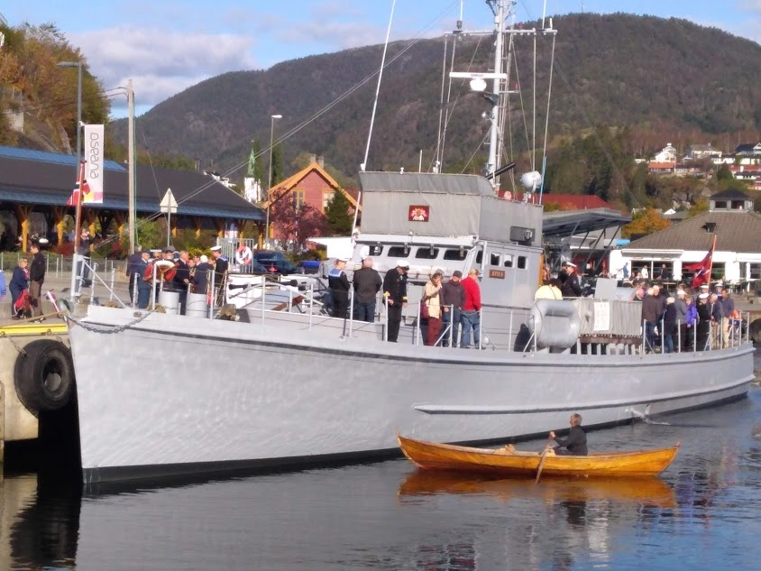 Hitra, en av tre MTB-båter som ble brukt mellom Shetland og Norge under siste del av andre verdenskrig.